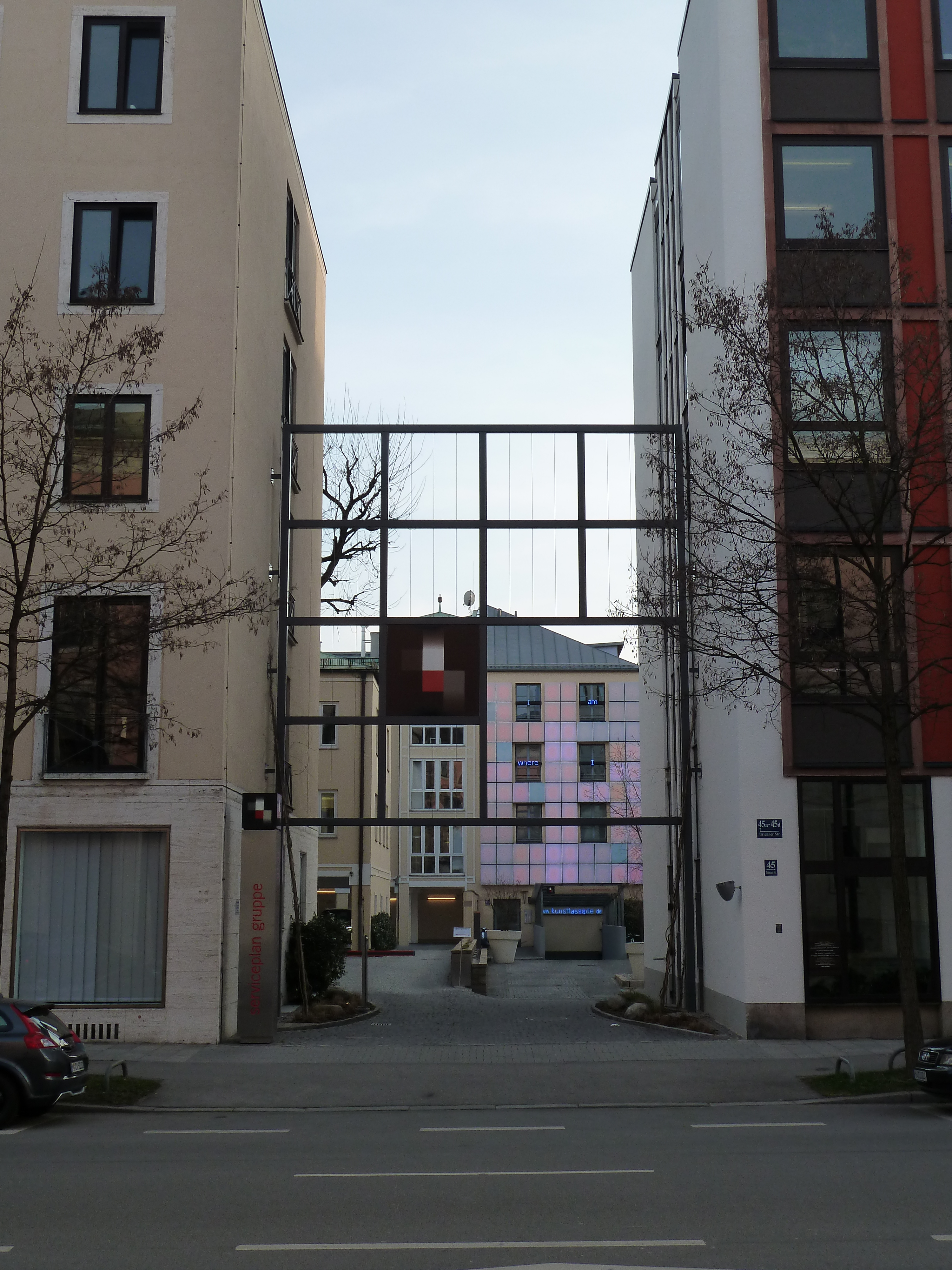 Serviceplan Gruppe für innovative Kommunikation